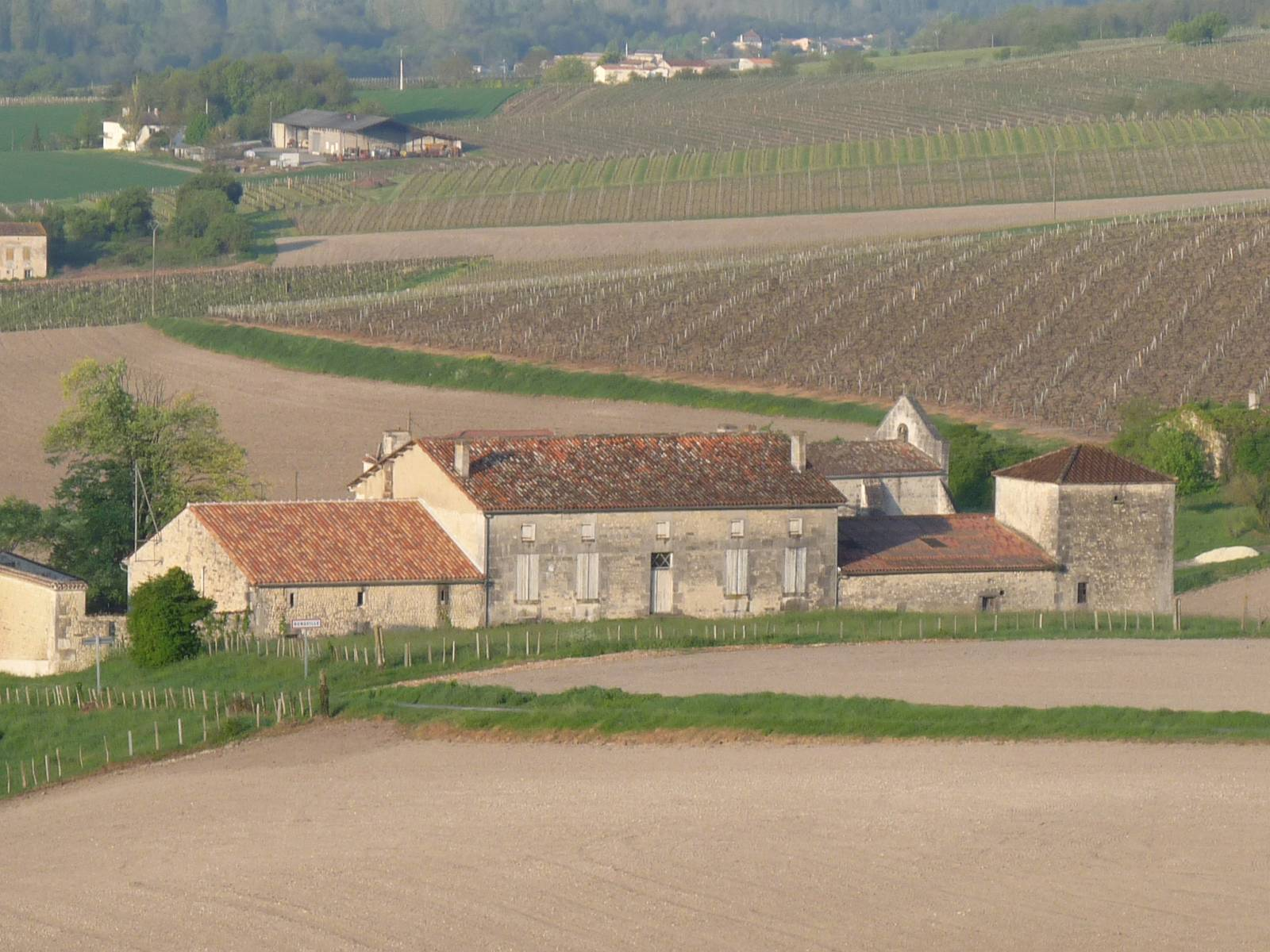 Vue du bourg de Nonaville, Charente, France